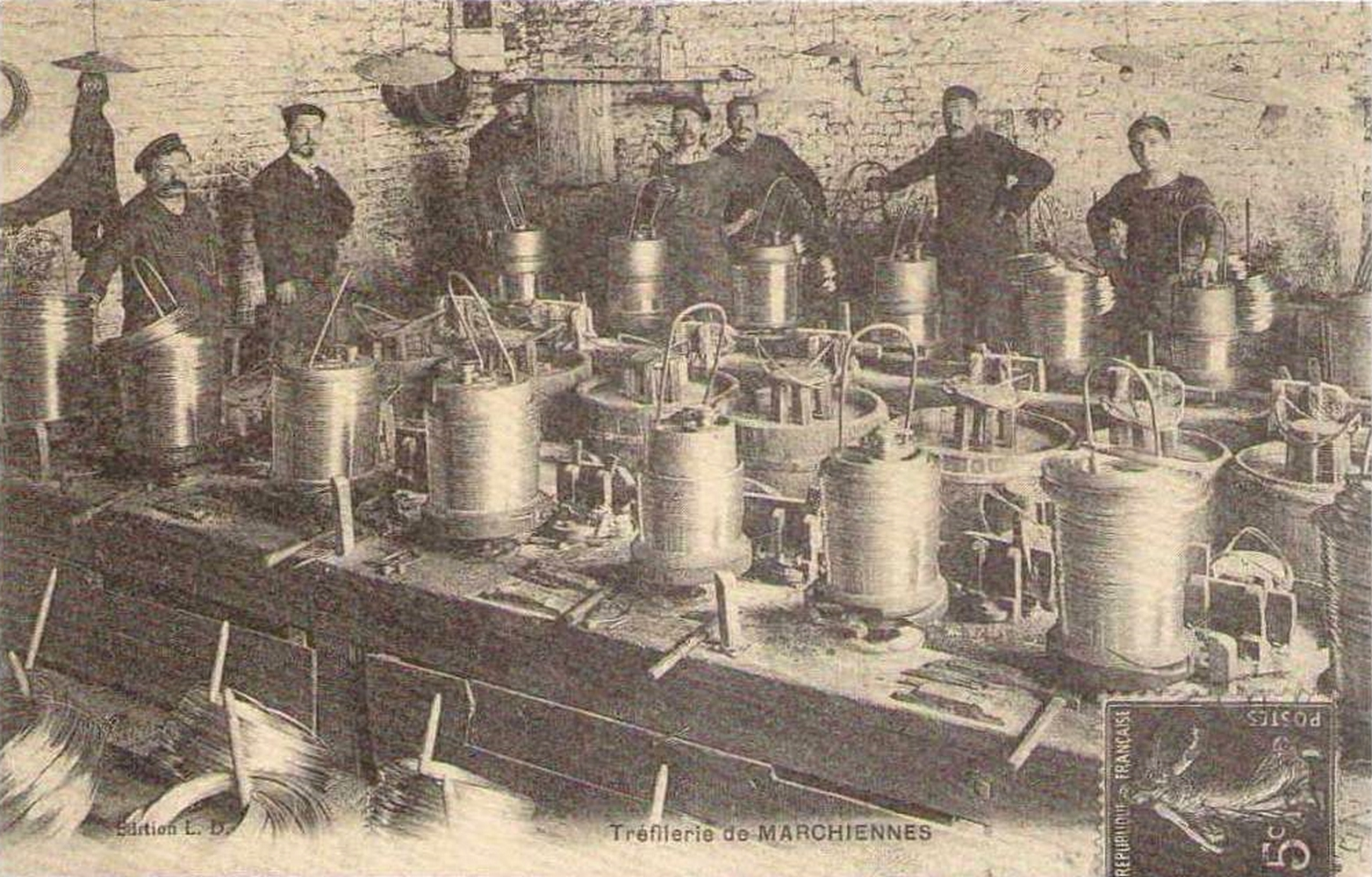 L'usine de la Tréfilerie a été installée sur le site de la Seconde Fosse de Marchiennes de la Compagnie des Canonniers à Marchiennes, Nord, Nord-Pas-de-Calais, France.